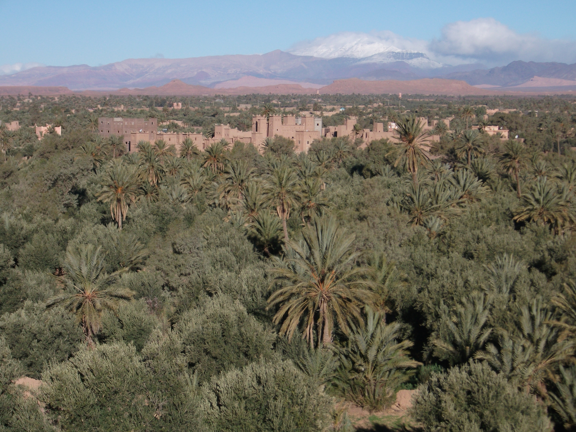 Skoura, Palmenoase u. Kasbah Amerhidil